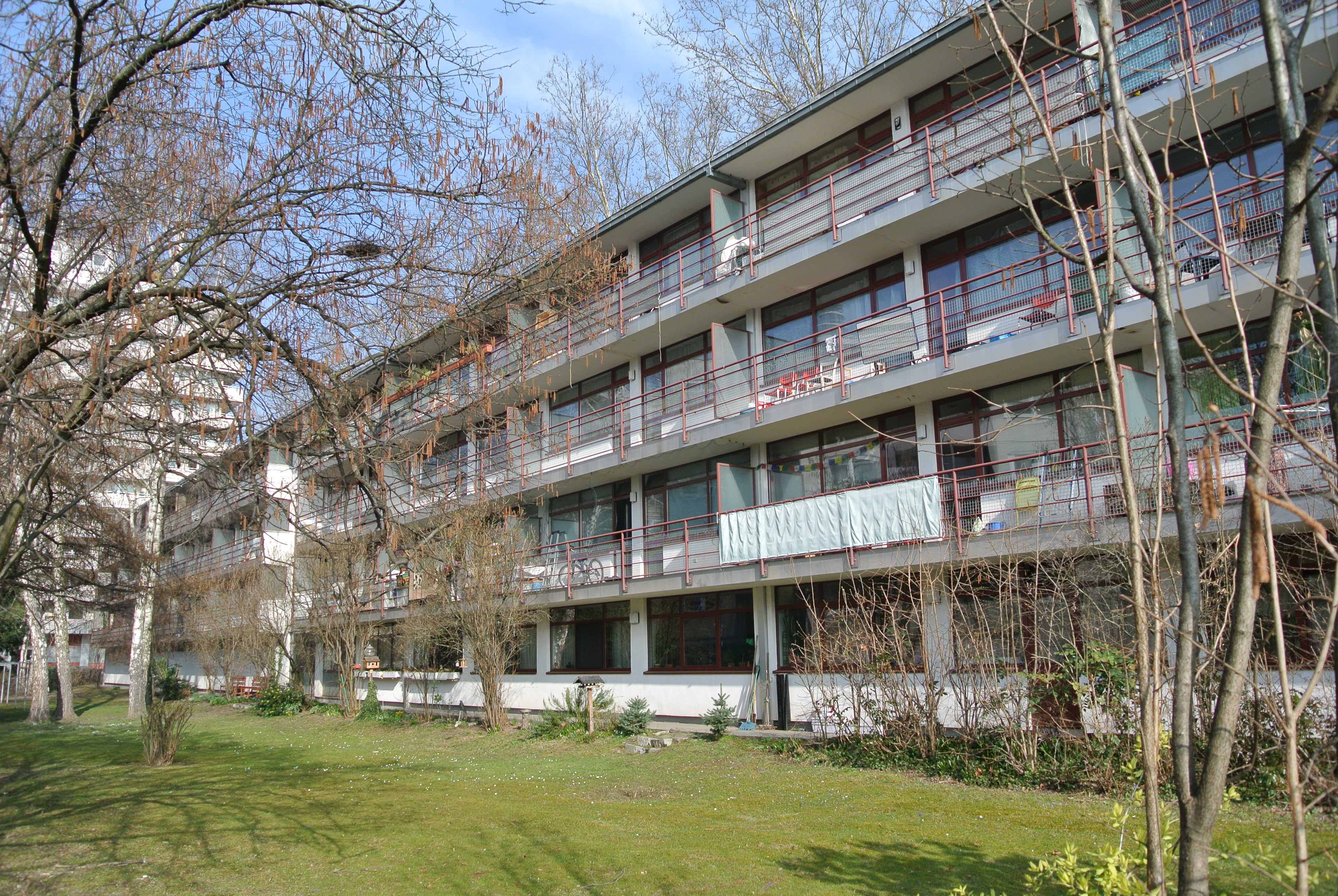 Siedlung Raimundstraße in Frankfurt-Dornbusch, 1930, Ledigenheim